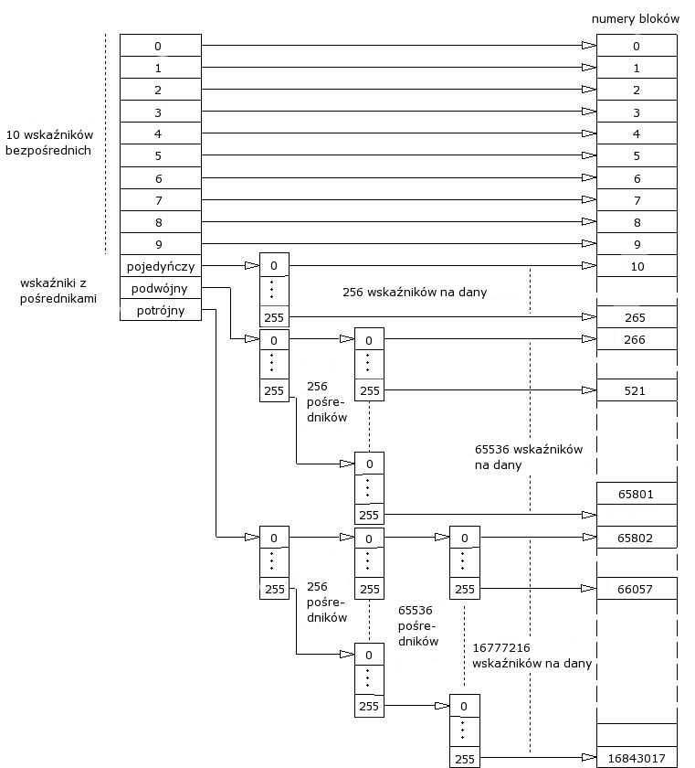 I-węzeł - struktura